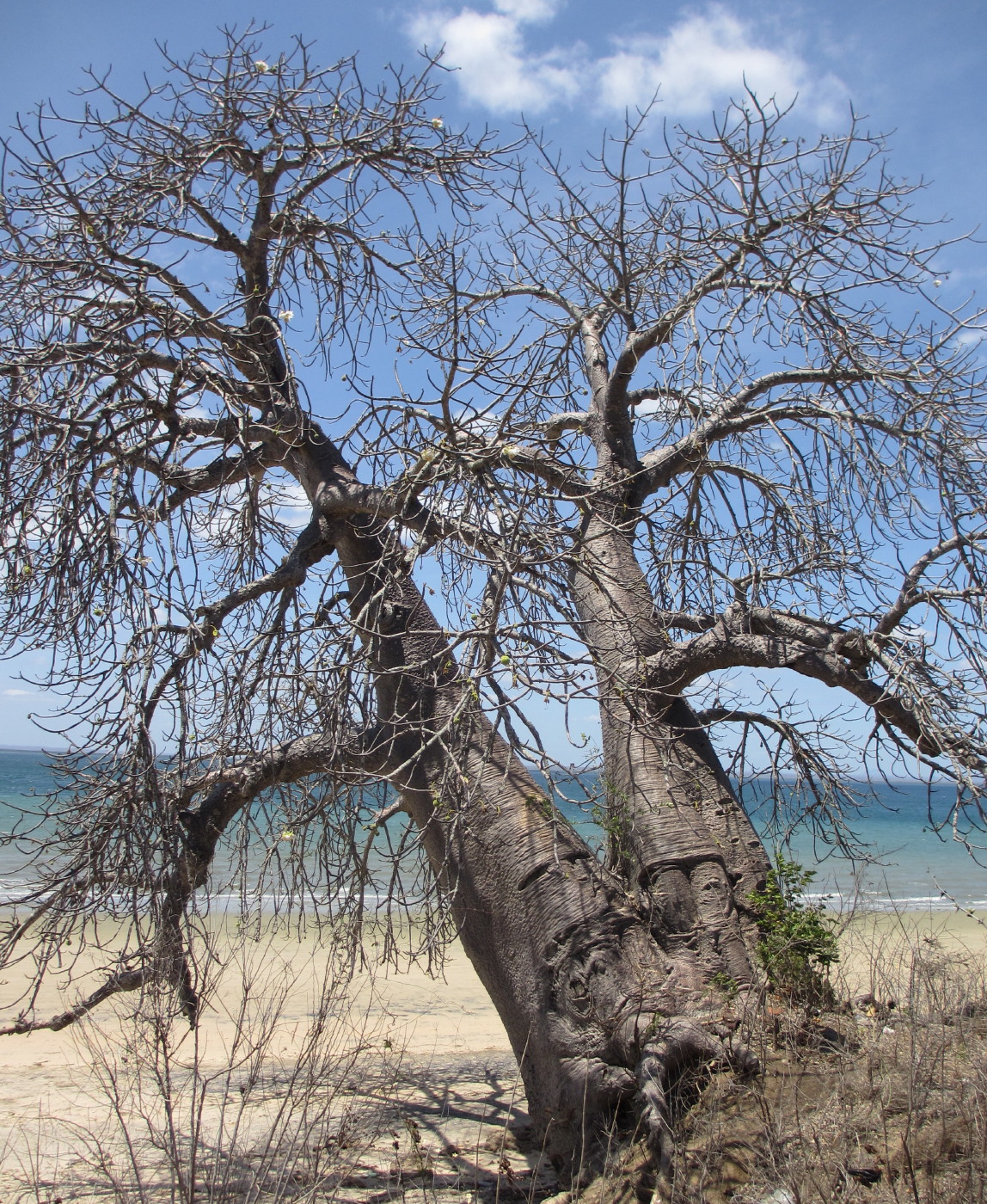 Baobab on Pemba Bay